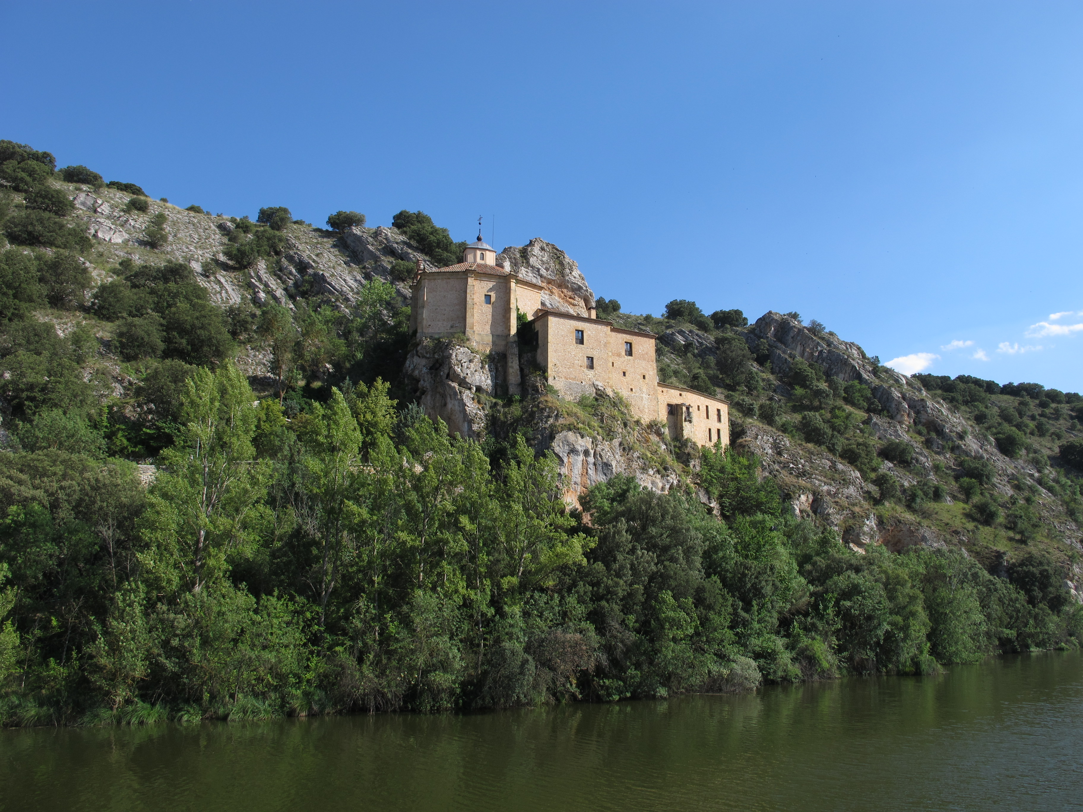 Soria (Spanien): Ermita de San Saturio (Blick über den Duero)